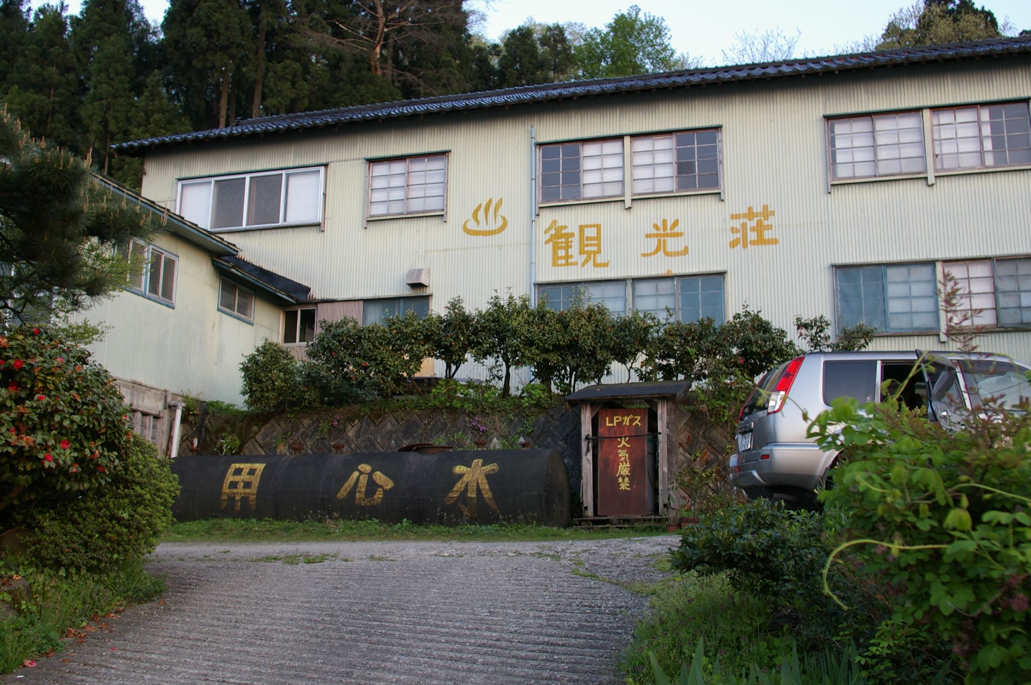 城端・林道温泉